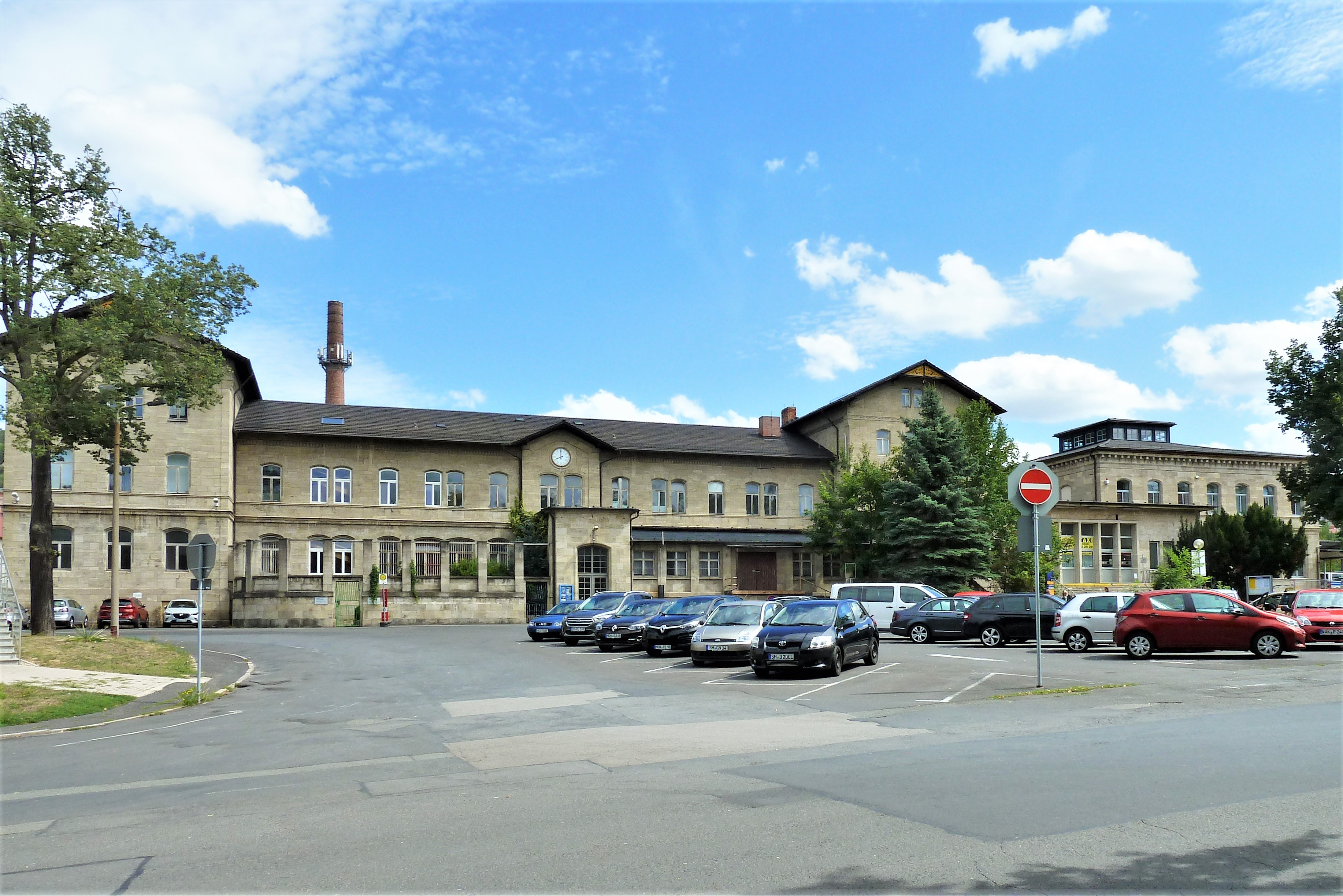 Bahnhof Meiningen, Empfangsgebäude, großes Gebäude Werrabahn/preußisch, rechts daneben die Bahnhofshalle und ganz rechts das Gebäude des Bayerischen Bahnhofs.